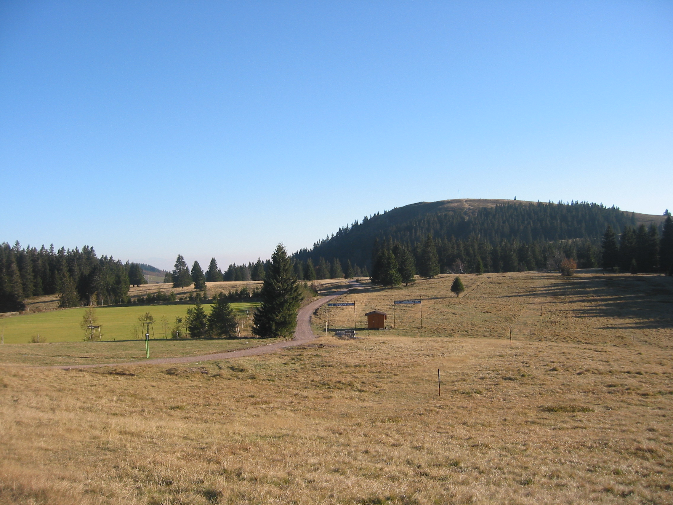 Die Nordseite des Herzogenhorns